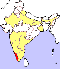 Kartorna bygger på resultat i senaste delstatsval (Juni 2004). Rött betyder att partiet deltar i delstatsregeringen, orange att partiet vann mandat i senaste delstatsvalet och gult att partiet hade lanserat kandidater men utan att vinna mandat. Kartorna tar inte hänsyn till avhopp, partifusioner och fyllnadsval under den ordinarie mandatperiodens gång.